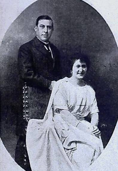 Voda de Andrés Corbal e Amelia Villanueva, fotografía en Vida Gallega 1920